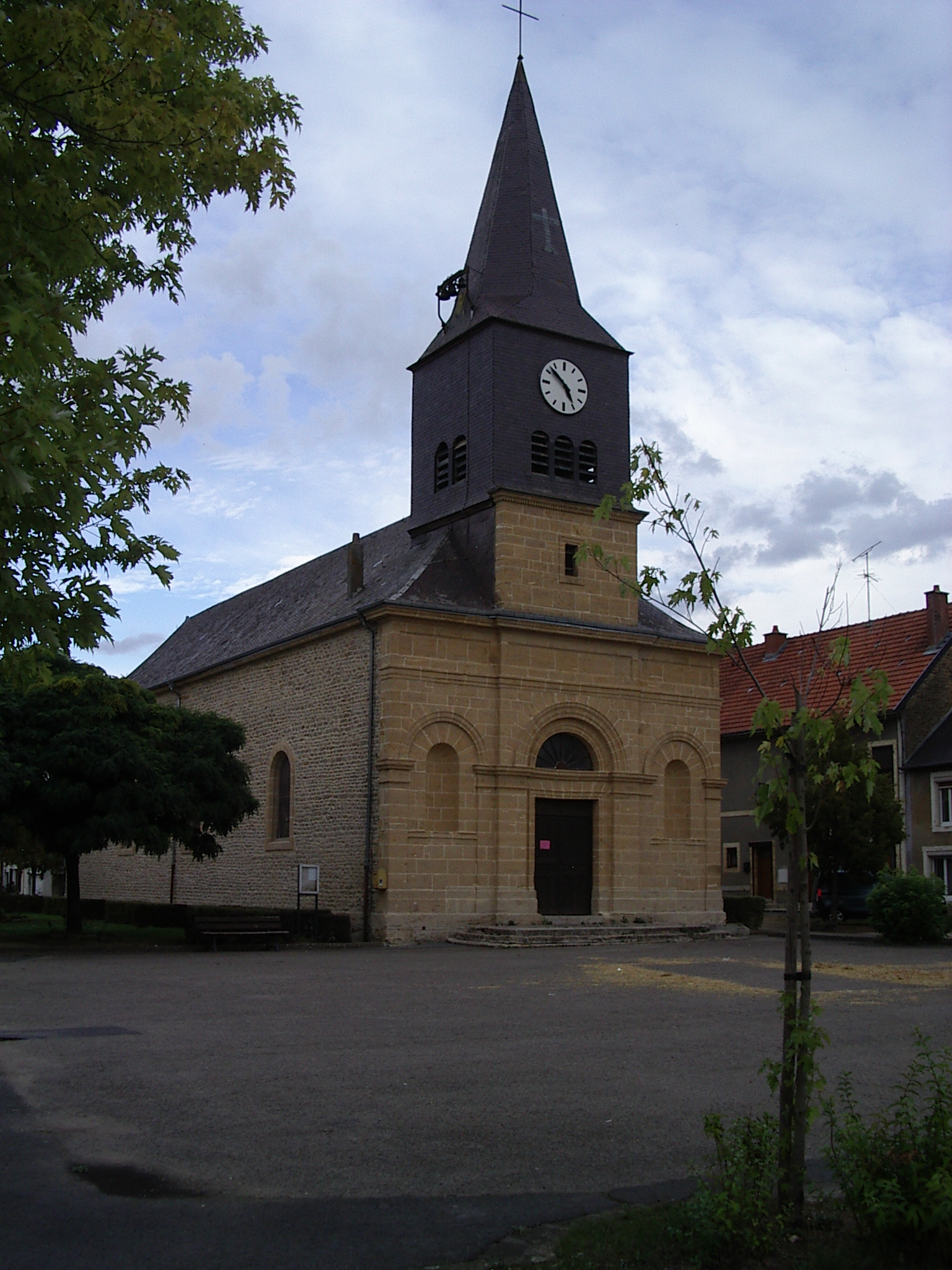 Eglise paroissiale : Pure est une commune française, située dans le département des Ardennes et la région Champagne-Ardenne.